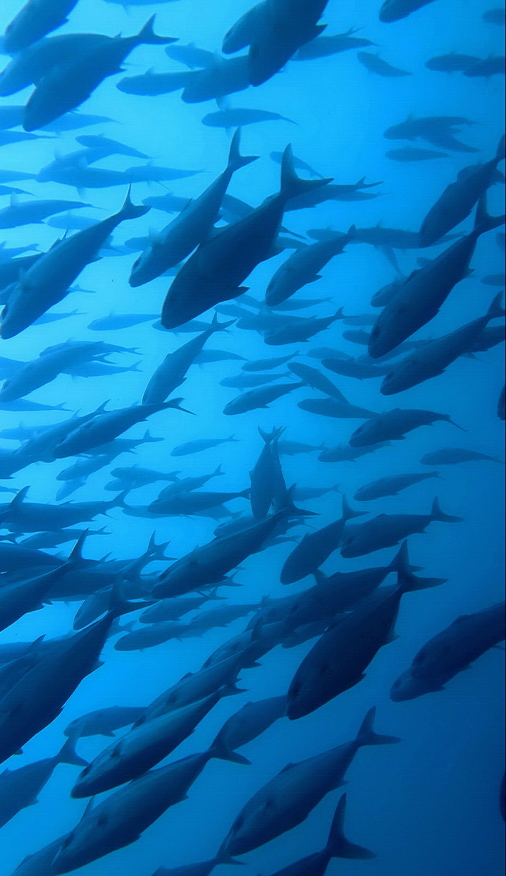 A school of Japanese amberjack (Seriola quinqueradiata) in the south shore of Long-Dong Bay, a famous scuba diving site located at northeast coast of TAIWAN. This photo was taken by Vincent C. Chen on May 23, 2015